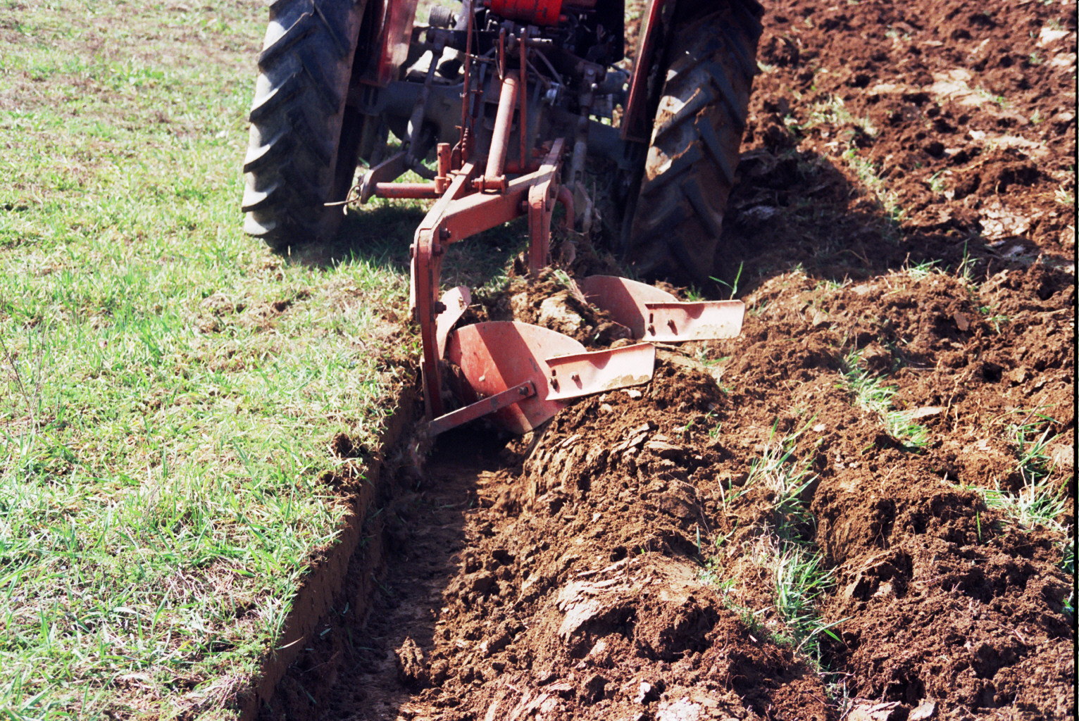 Орање, плуг у агрегату са трактором - Наупаре 2004. (фото: Михаило Грбић)